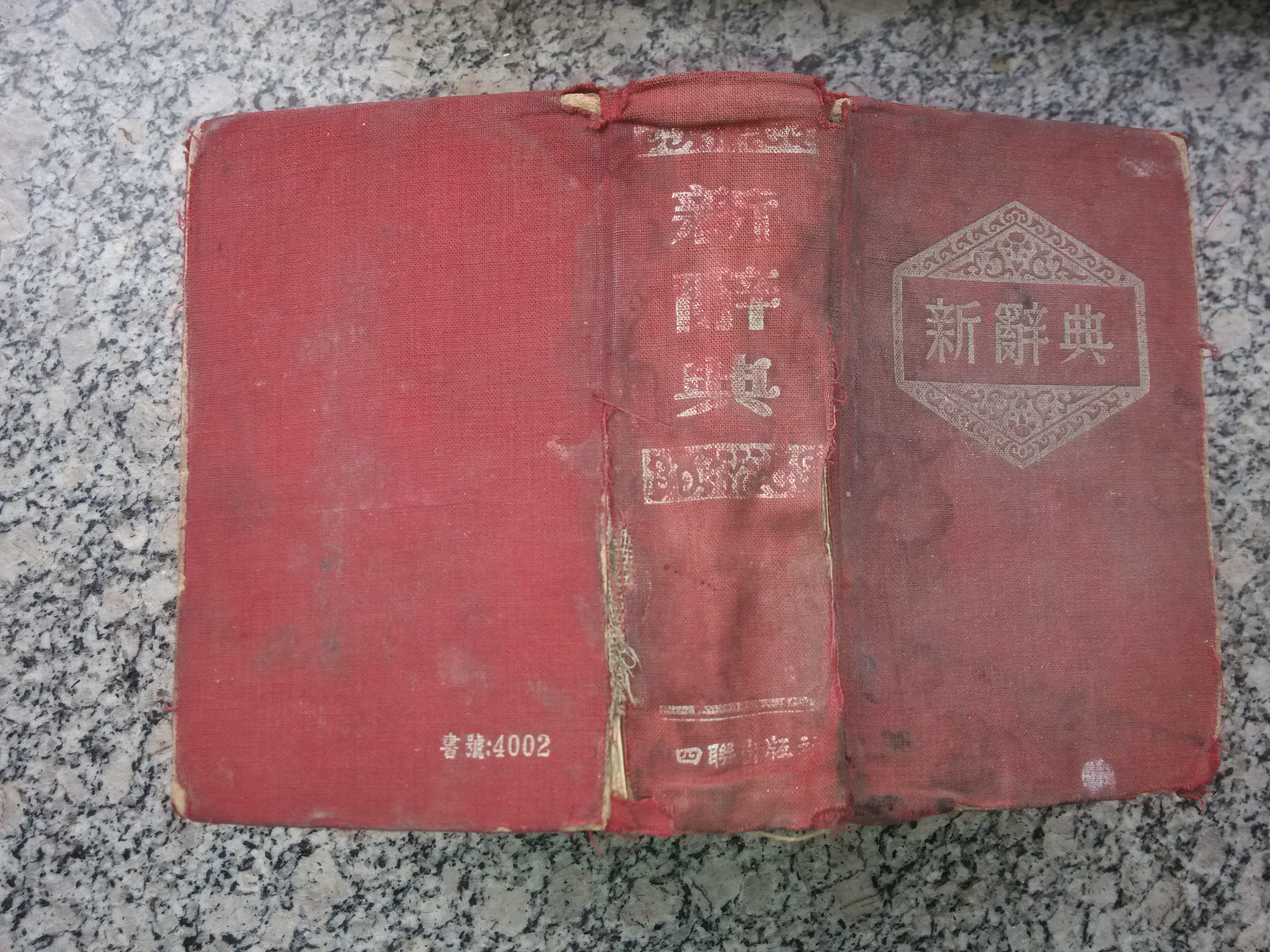 四联出版社出版物：新辞典（1954年5月重三版）。摄于山西省朔州市应县金城镇东街某居民家中。